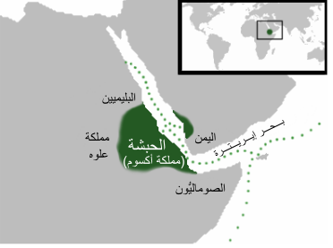 مملكة أكسوم الحبشيَّة أو الحبشة في أقصى اتساعها.